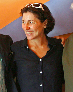 Cássia Kiss em almoço na Glória.